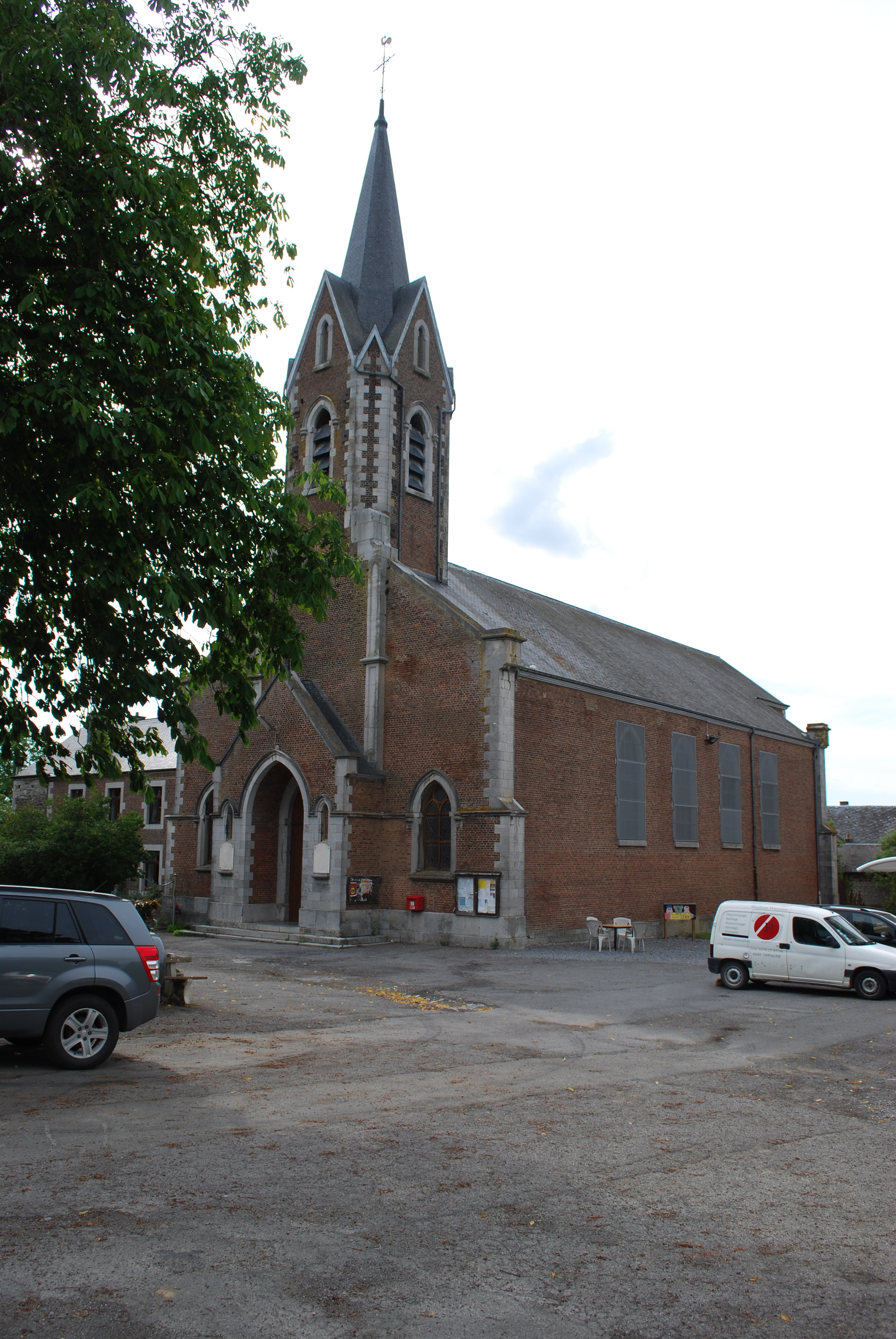 L'église Saint-Germain-l'Auxerrois à Izier (Durbuy).